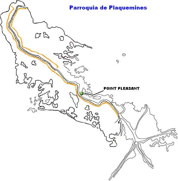 Point Pleasant, Louisiana.